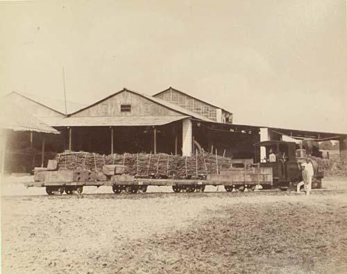 Orenstein & Koppel - Zuckerfabrik Tempeh, Loemadjang.